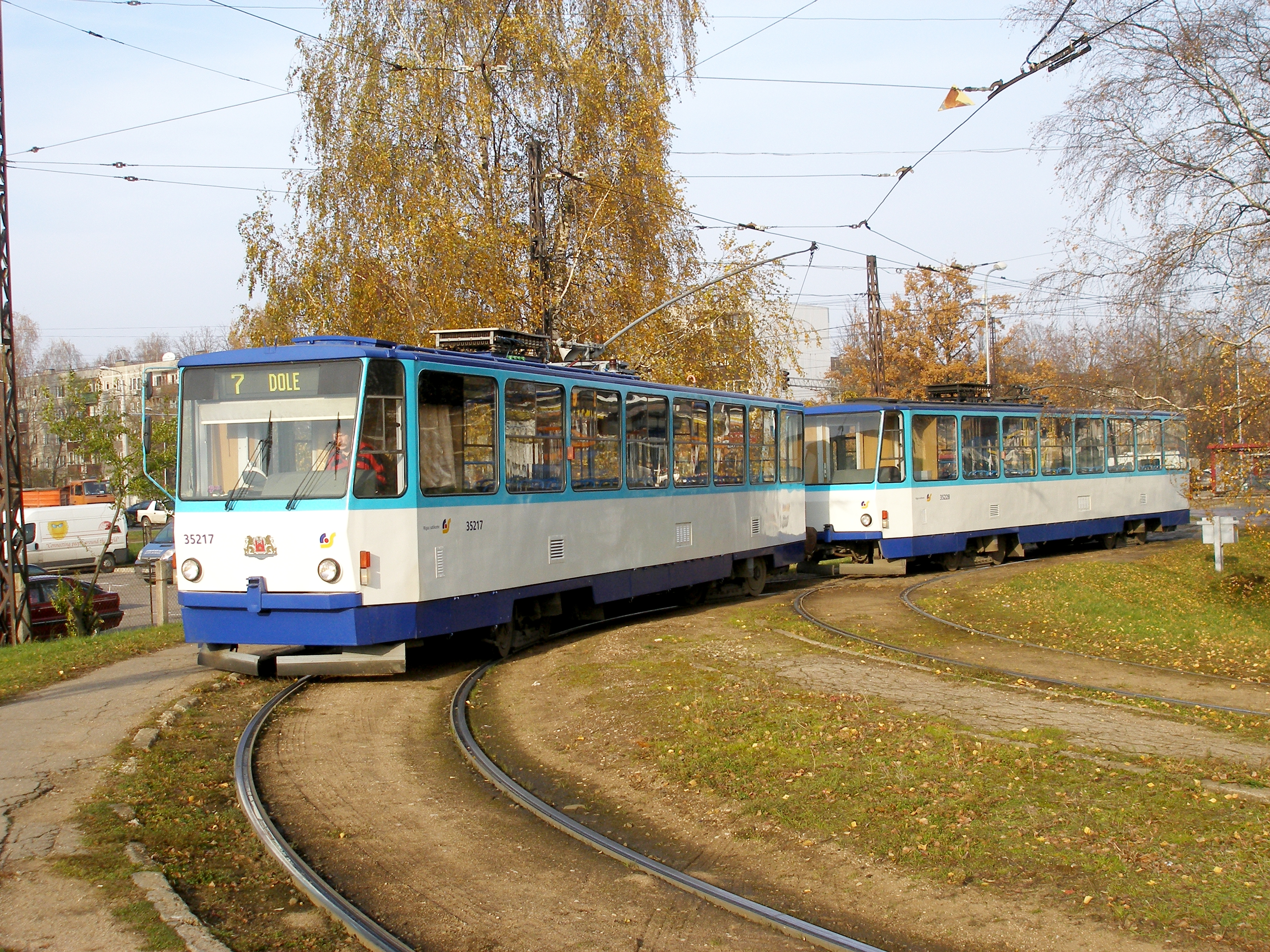 Trams in Riga, Latvia